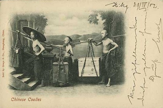 中國苦力照相